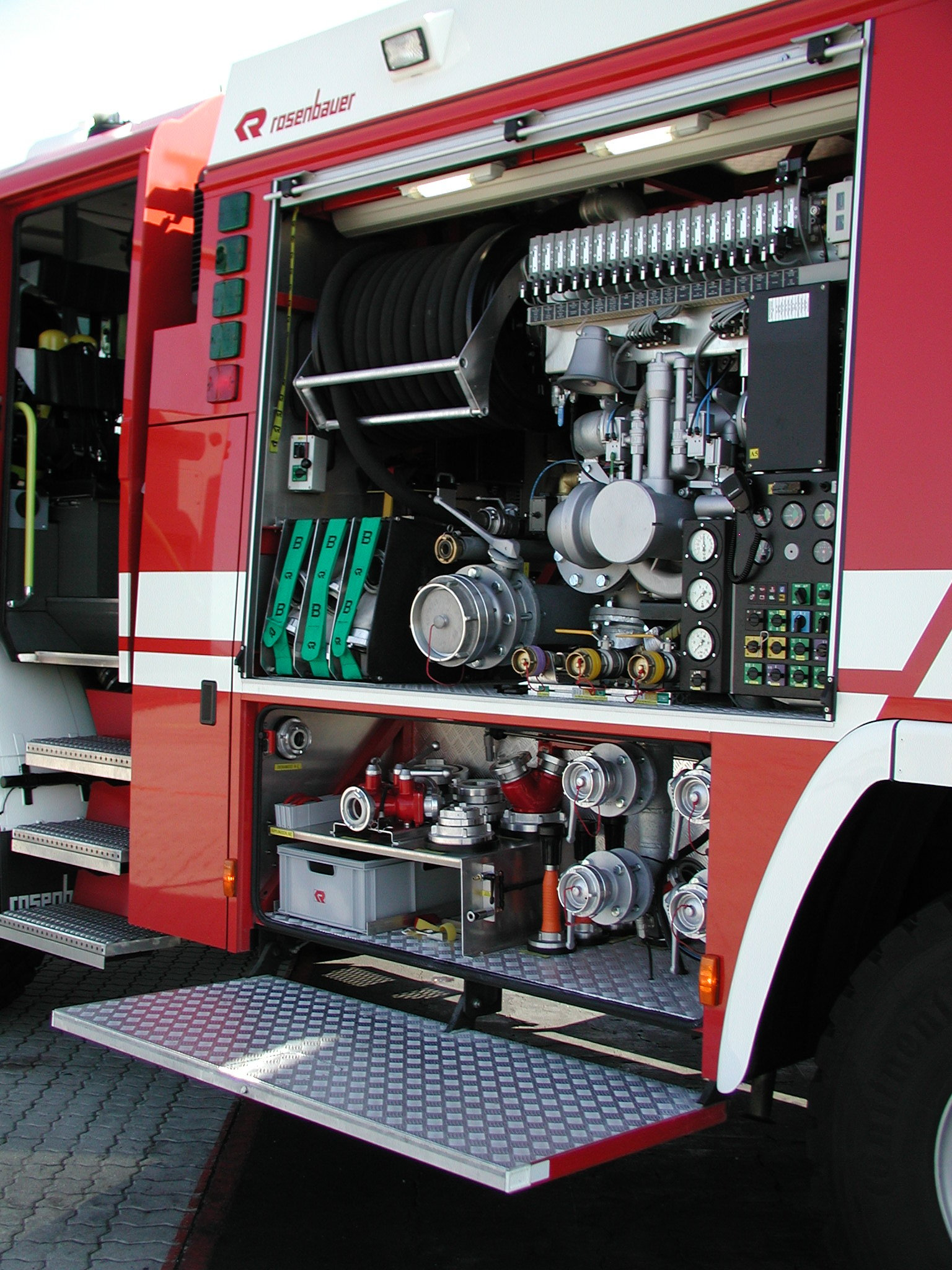 Einbaupumpe des FLF 5000/1000 der Flughafenfeuerwehr Hörsching